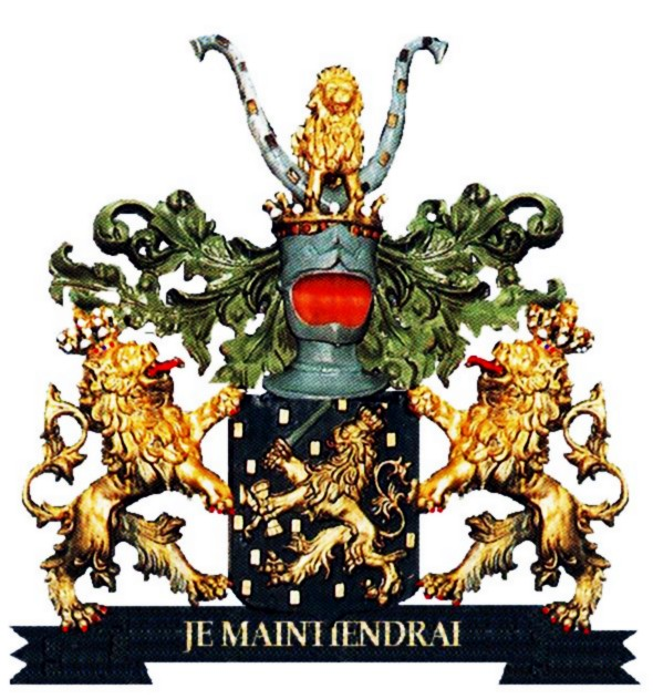 Eigen bewerkte foto en tekening Schild uit de 19e eeuw